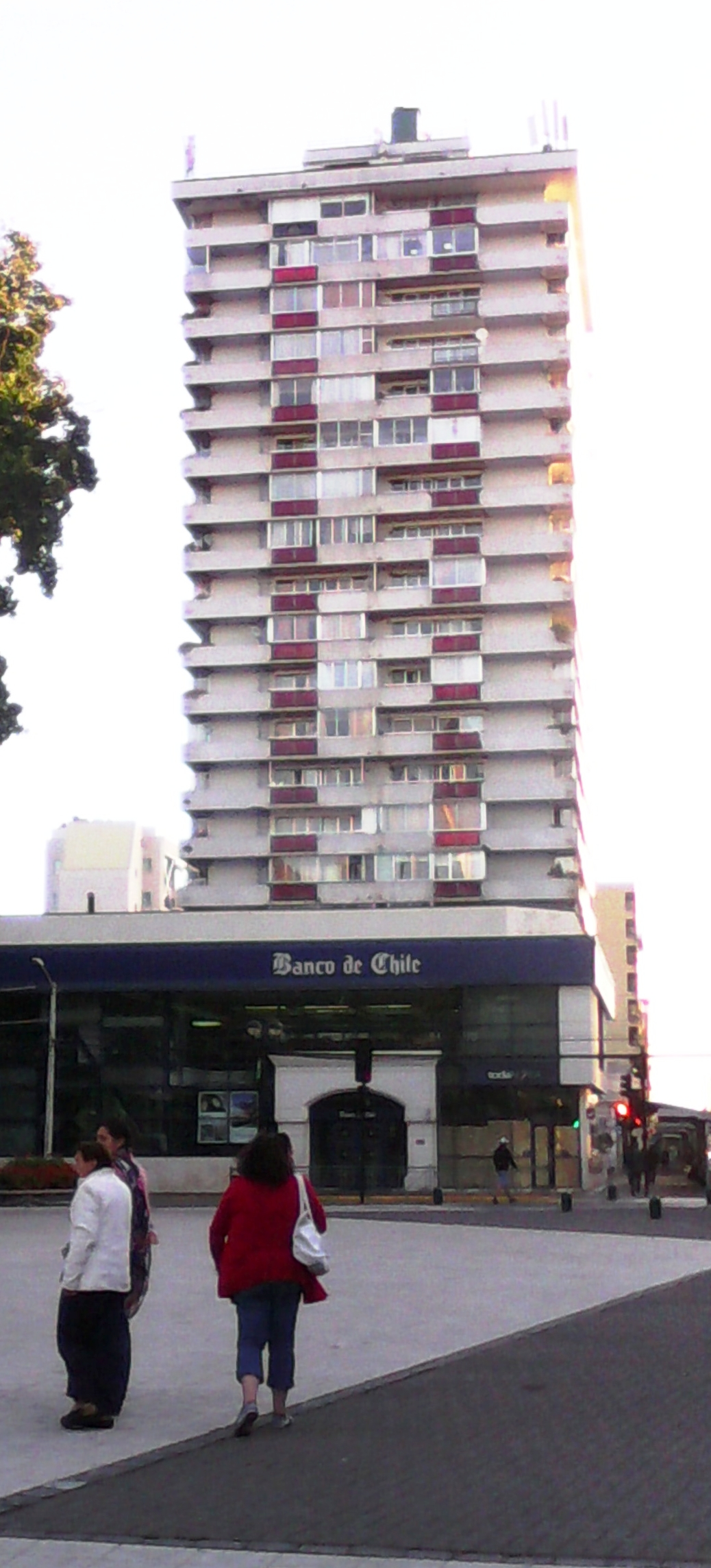 Edificio Banco de Chile y sucursal del Banco de Chile de Prat con Varas, en el centro de la ciudad de Temuco, Chile, vistos desde la plaza Aníbal Pinto.